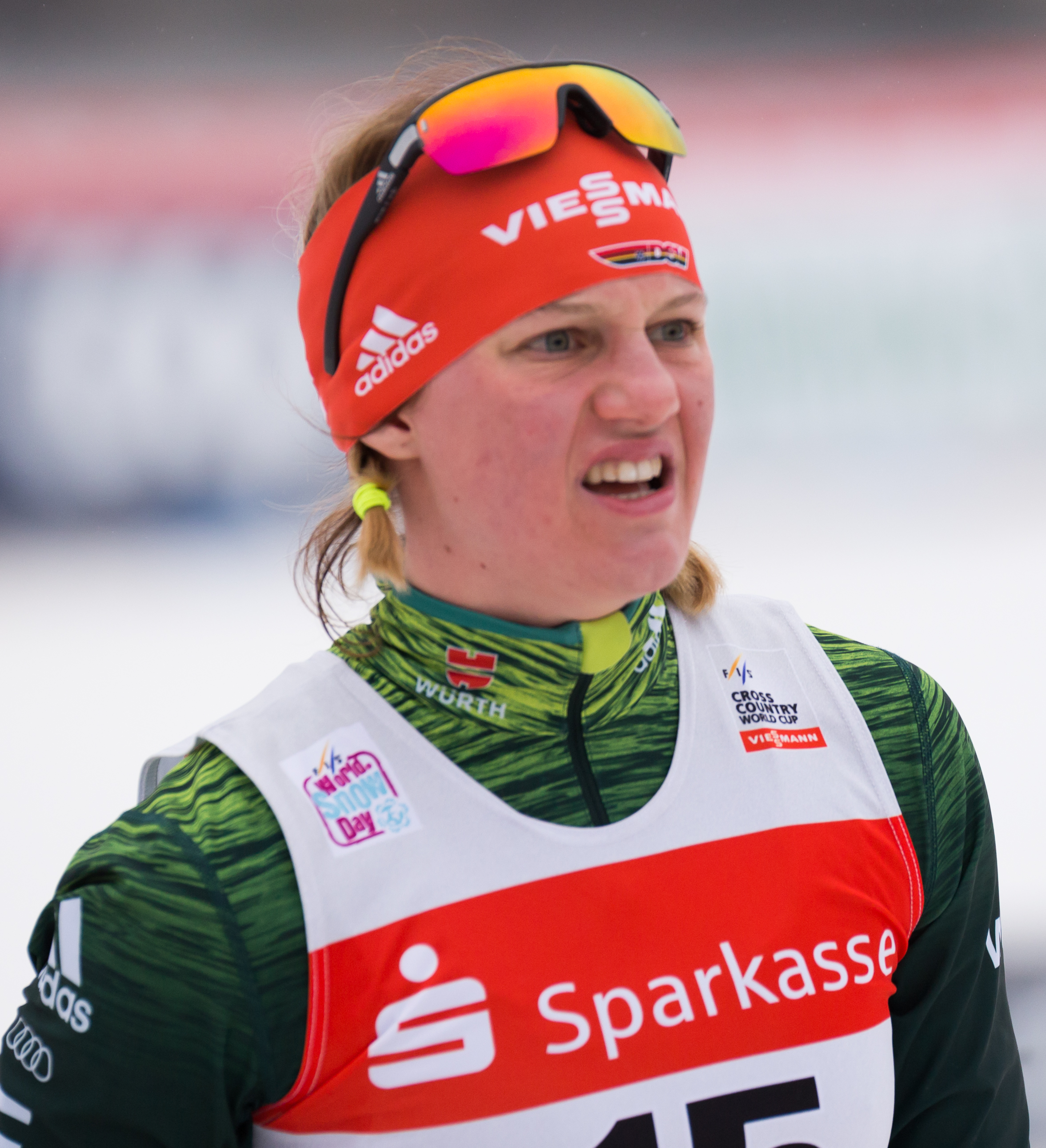 Victoria Carl (GER, Deutschland)